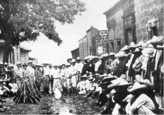 Cristeros armados